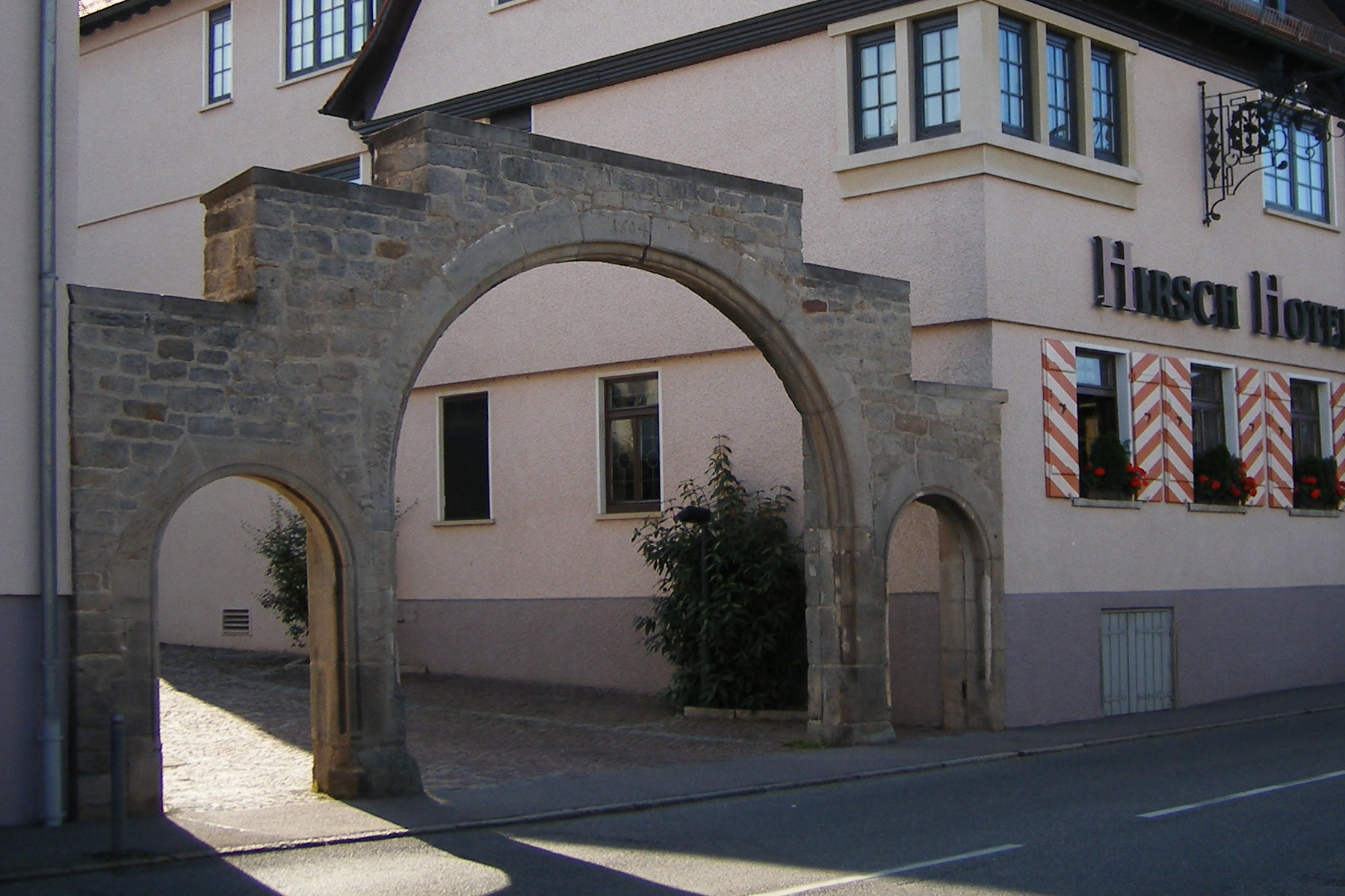 Ostfildern Ruit Stuttgarter Str. 7 Hirschbogen 1604